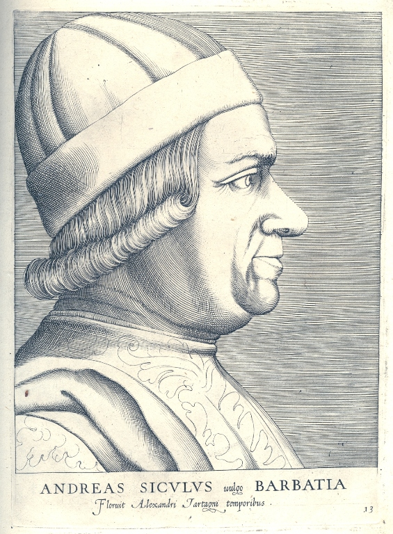 Andrea Barbazza (ca. 1410-1480)